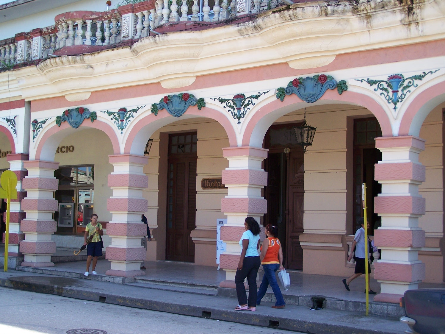 Frente de la Casa de Iberoamérica